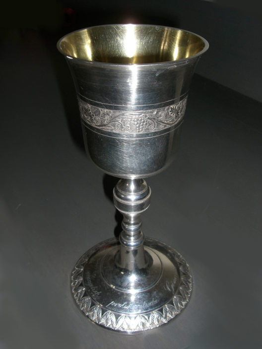 evangelischer Abendmahlskelch aus dem Jahr 1831